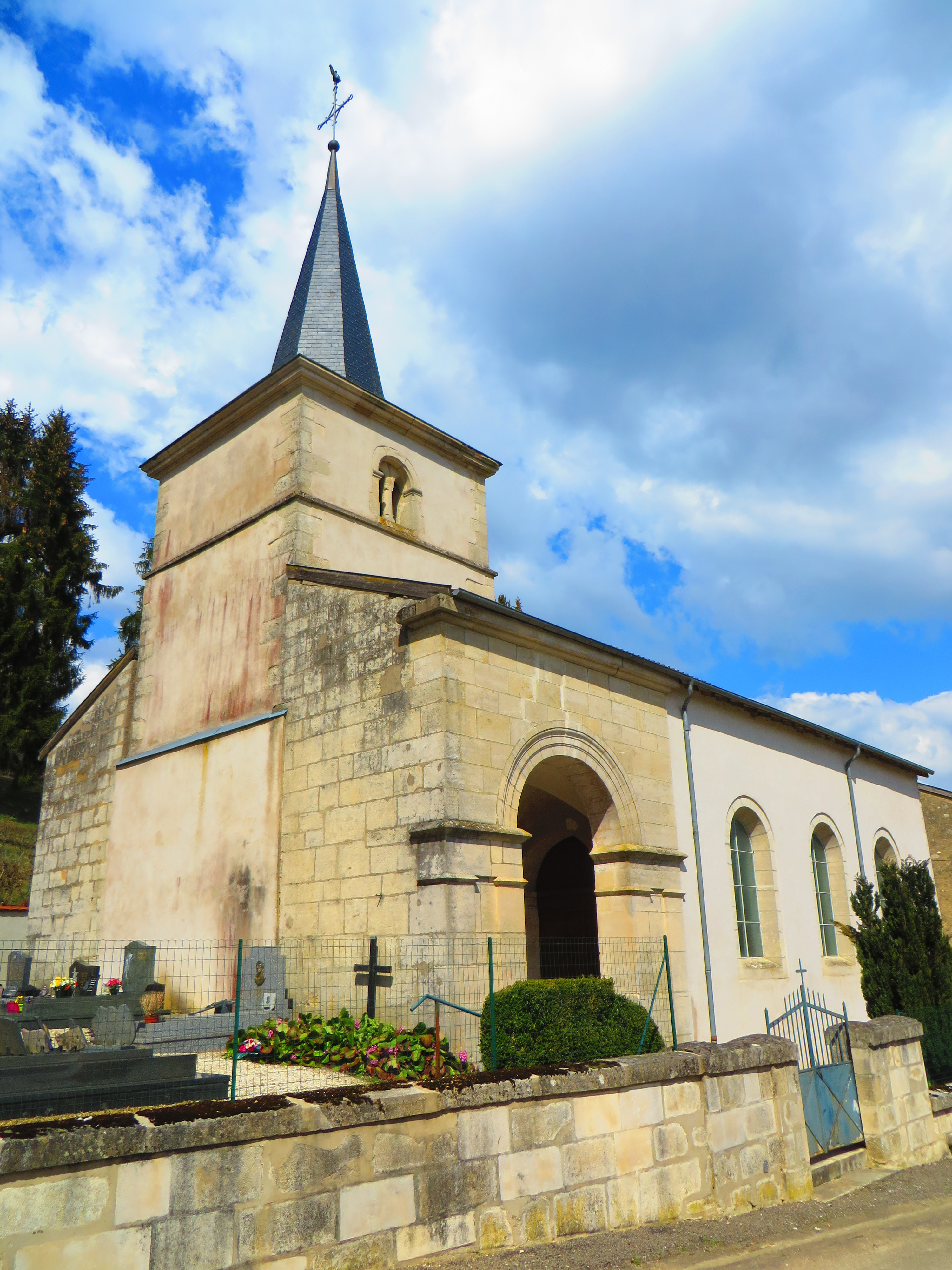 Dommartin-la-Montagne Église Saint-Martin